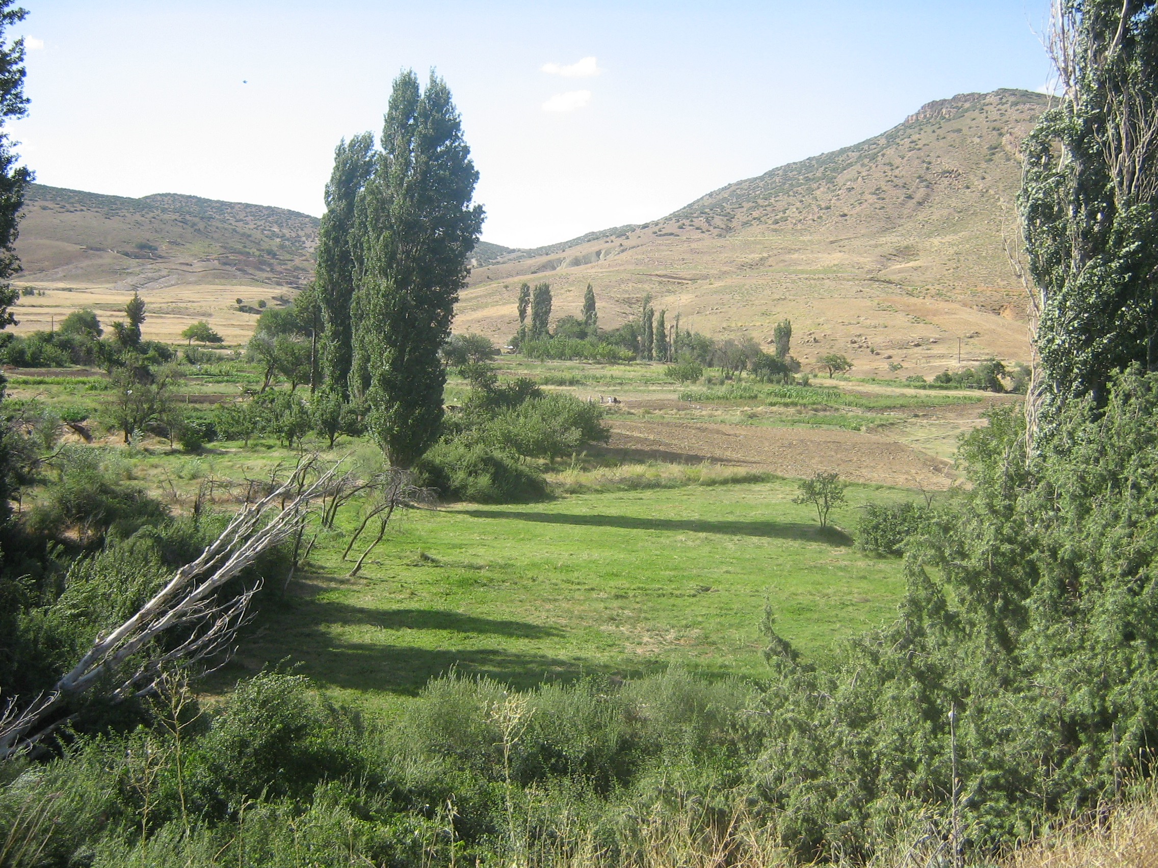 Image prise à partir du village d'Ighz'arn Taqqa ou Oued Taga dans les Aurès. Photo personnelle de 3bdalkarim, libre de droit.